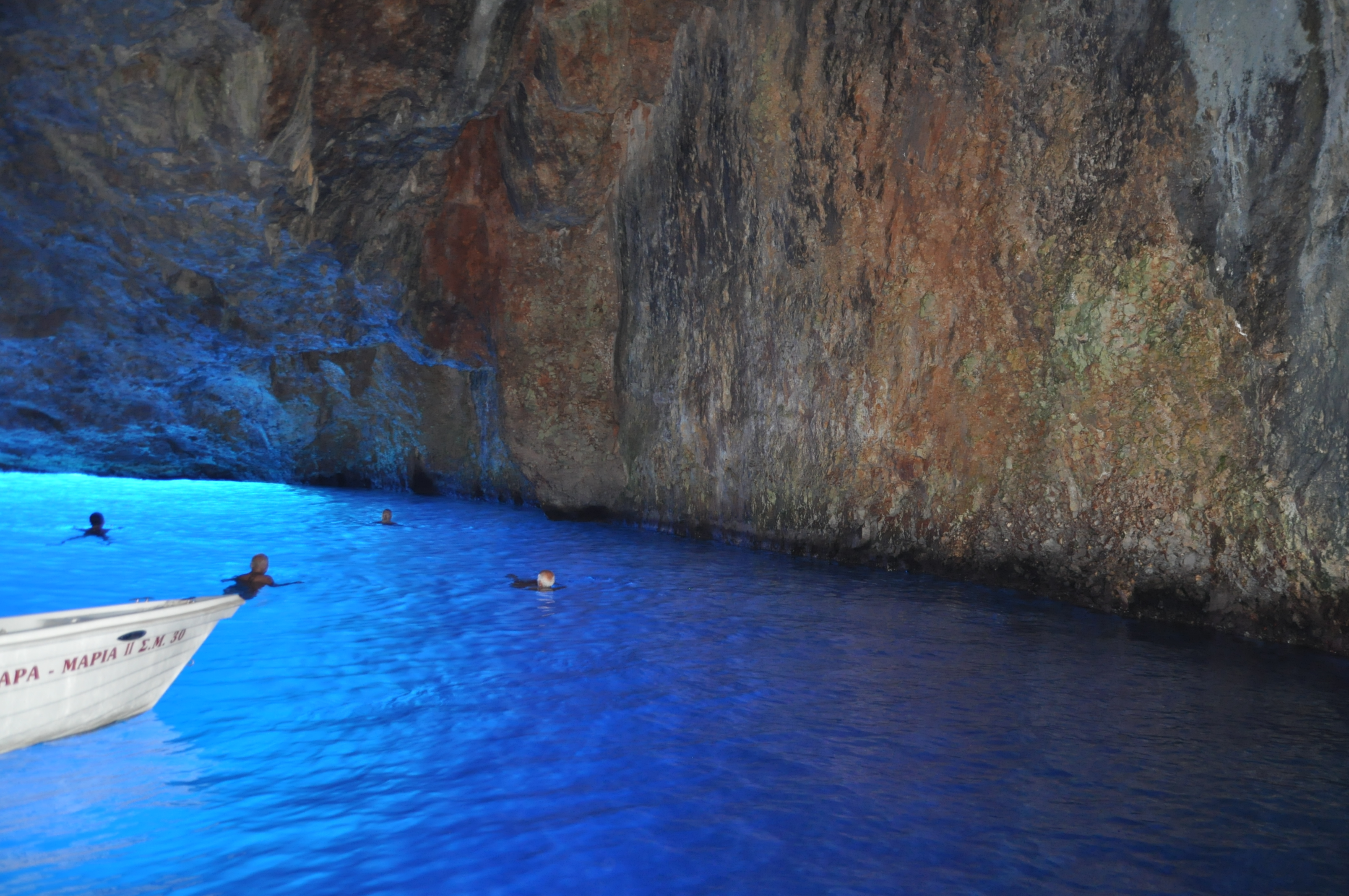 Δωδεκάνησα ,Καστελόριζο,Μπλέ Σπηλιά This is a photography of Natura 2000 protected area with ID GR4210004